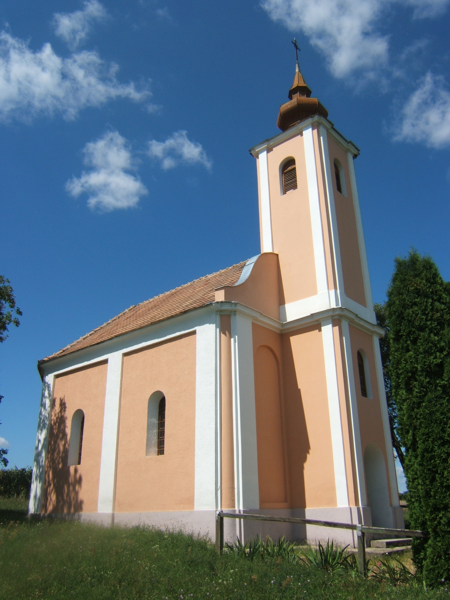 Kápolna a kéthelyi szőlőhegyen, 1870-ben épült, azonosító -7432